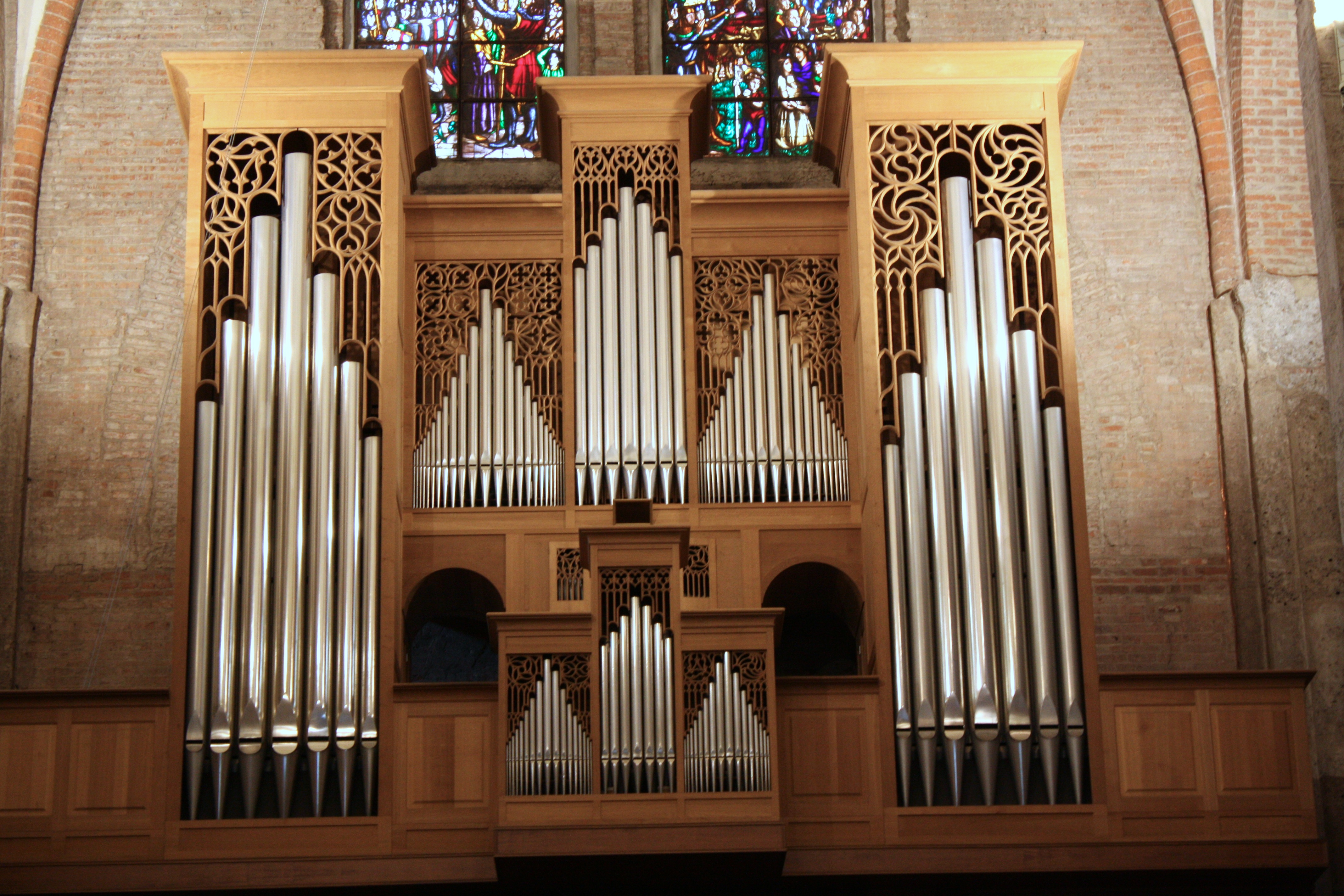 Ahrend-Orgel von San Simpliciano, Milano/Mailand, Italien